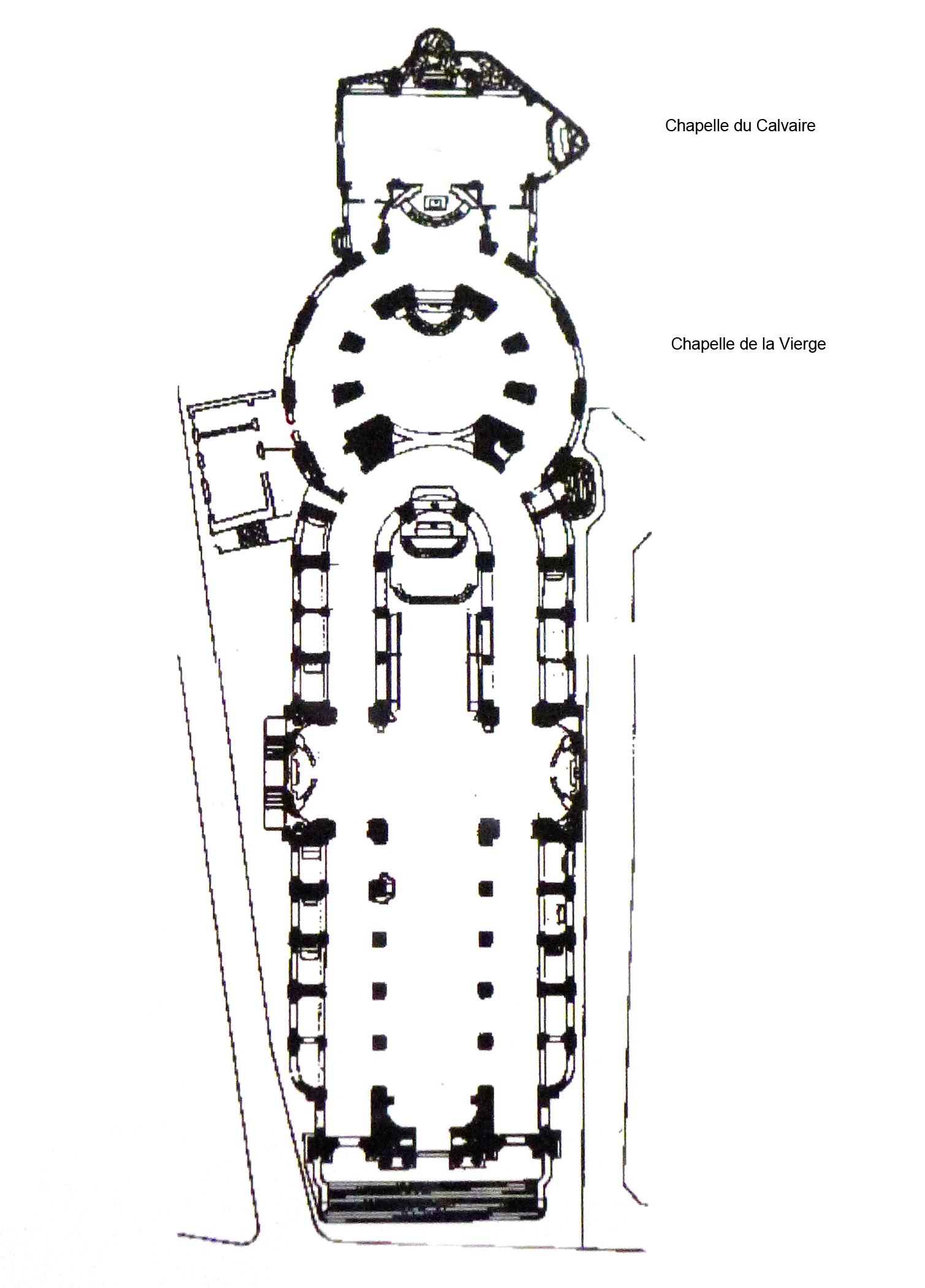 Plan de l'église Saint-Roch d'après le plan affiché dans l'édifice - Paris Ier.